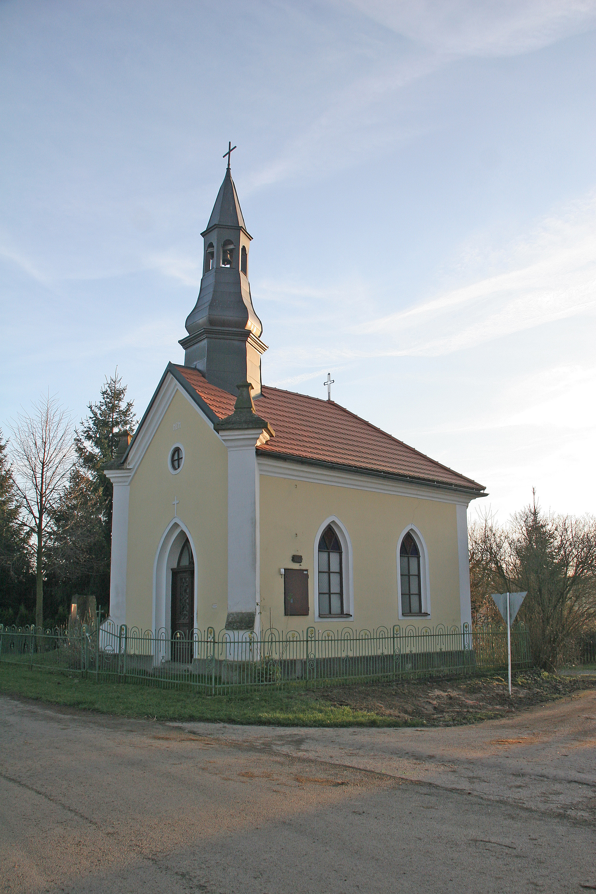 Vojenice kaple